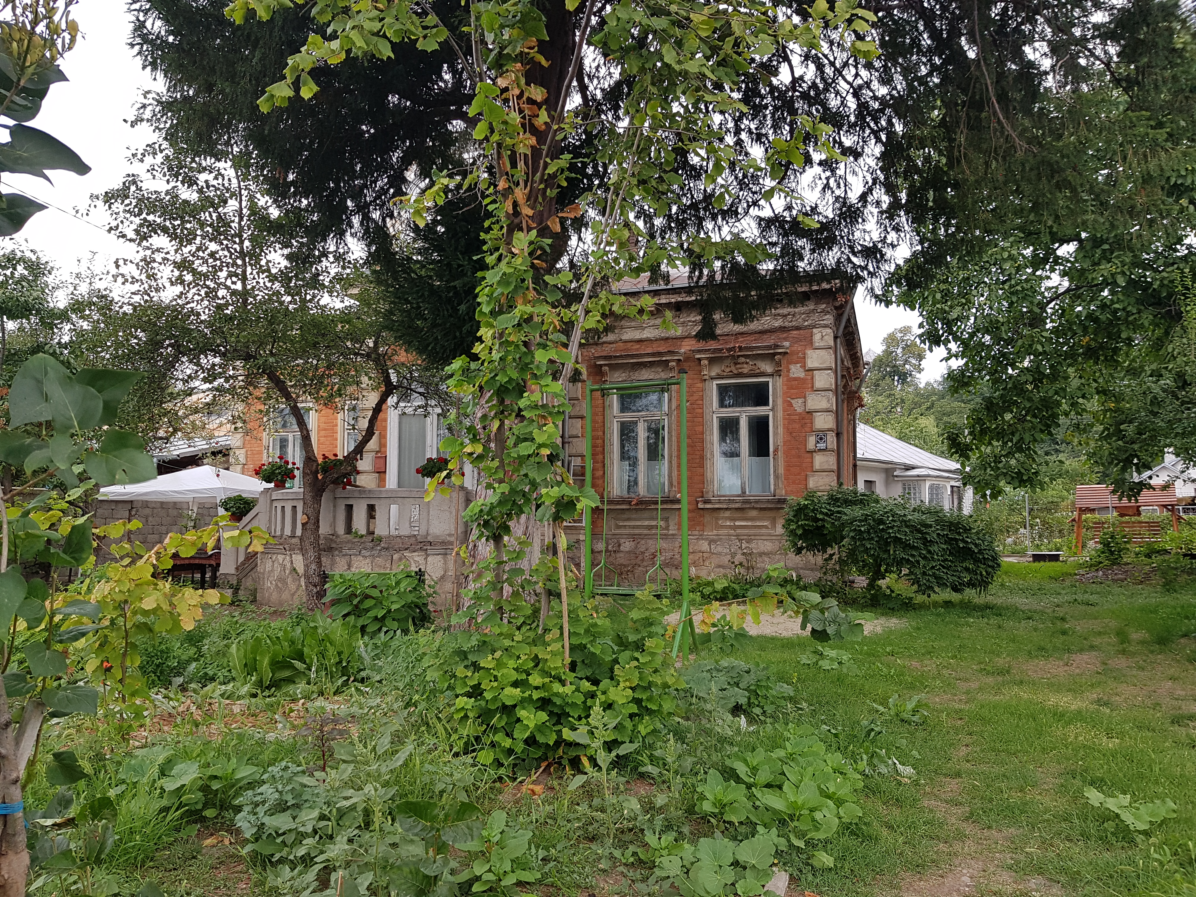 Casa Apostu